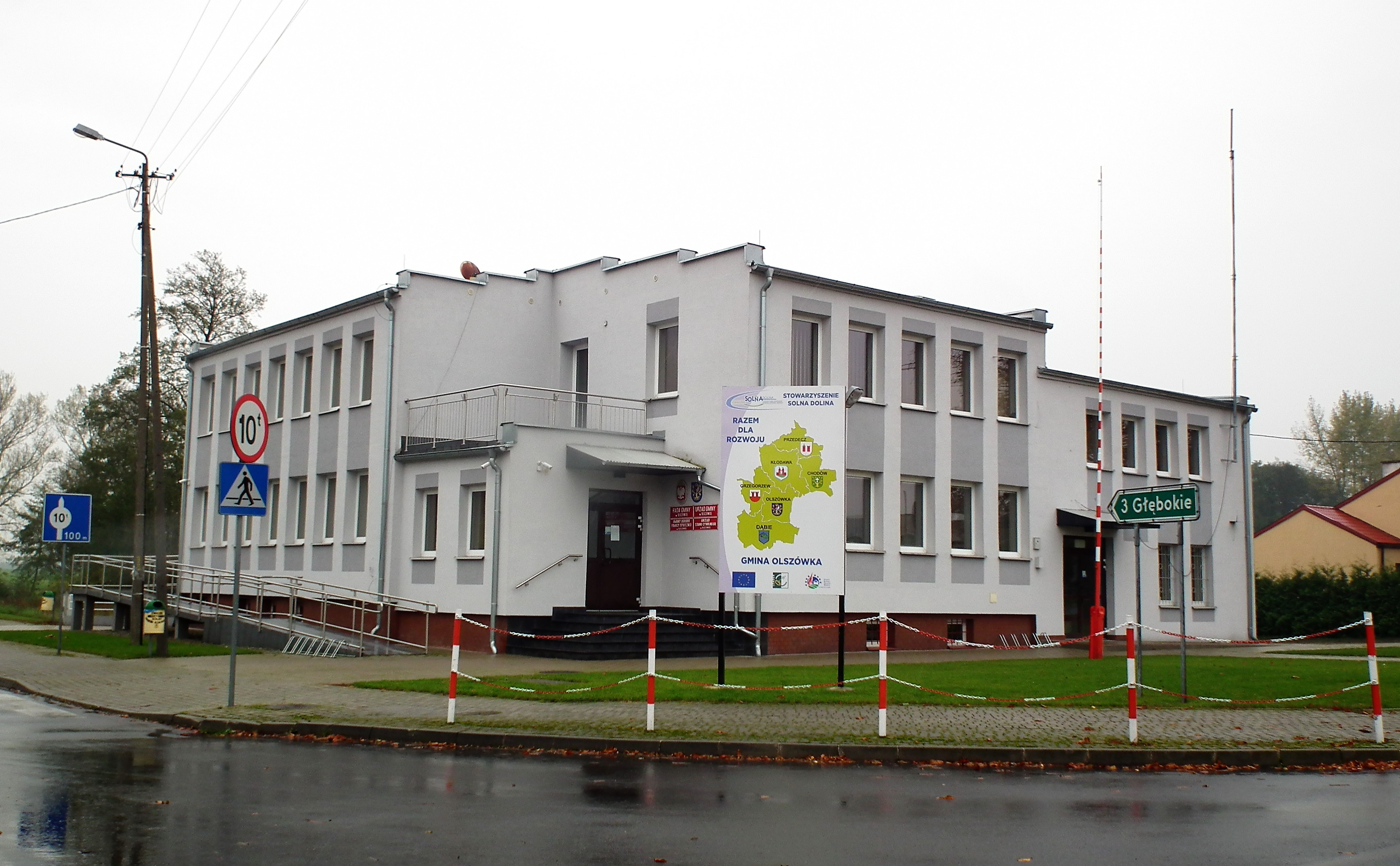 Budynek UG w Olszówce i tablica inform.